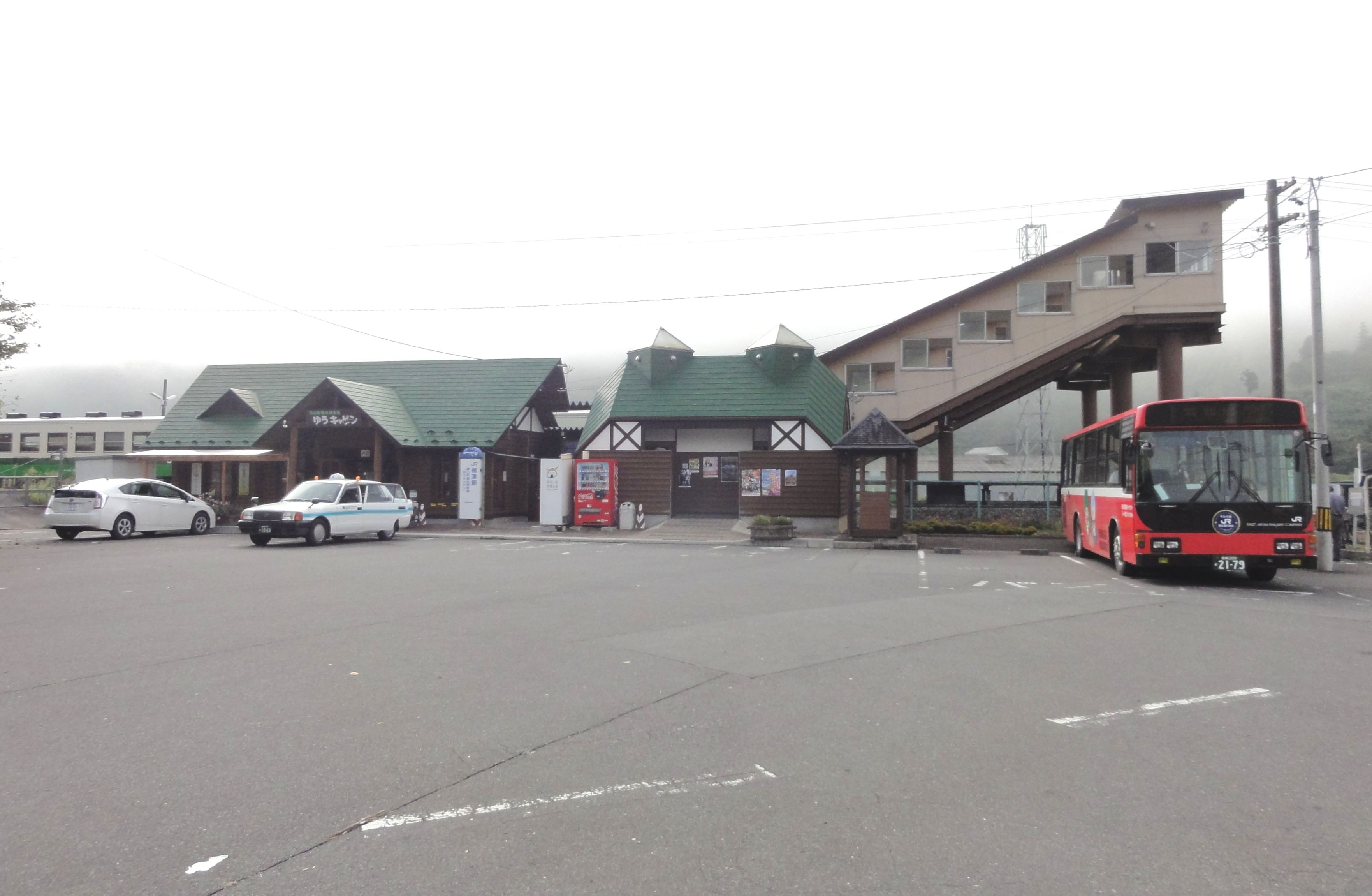 柳津駅